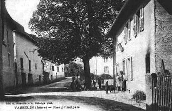 Vasselin rue centrale sur une carte postale ancienne.